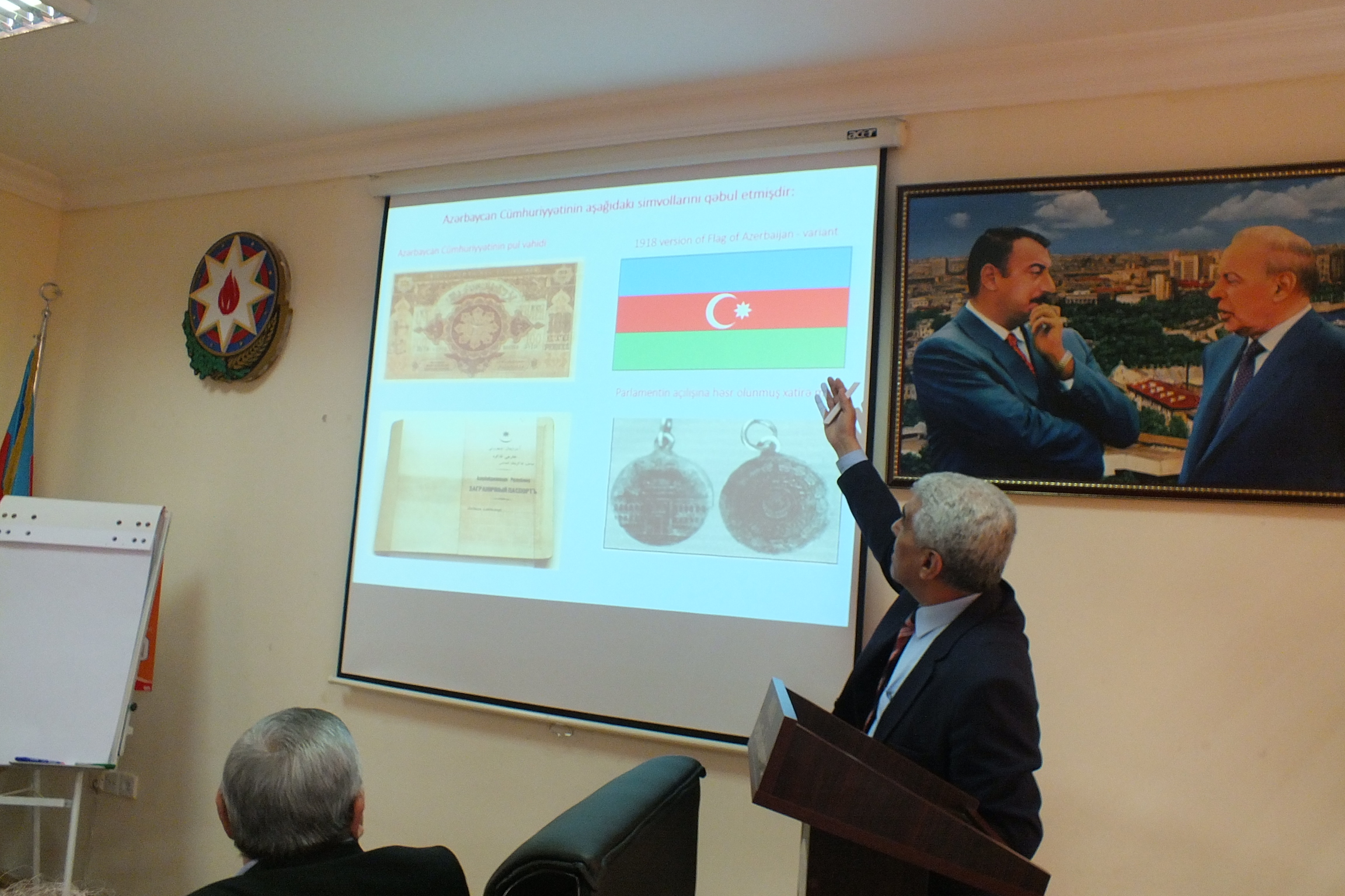 AMEA ak.H.Ə.Əliyev adına Coğrafiya İnstitutu AXC 110 illik yubiley tədbiri Ənvər Əliyevin çıxışı